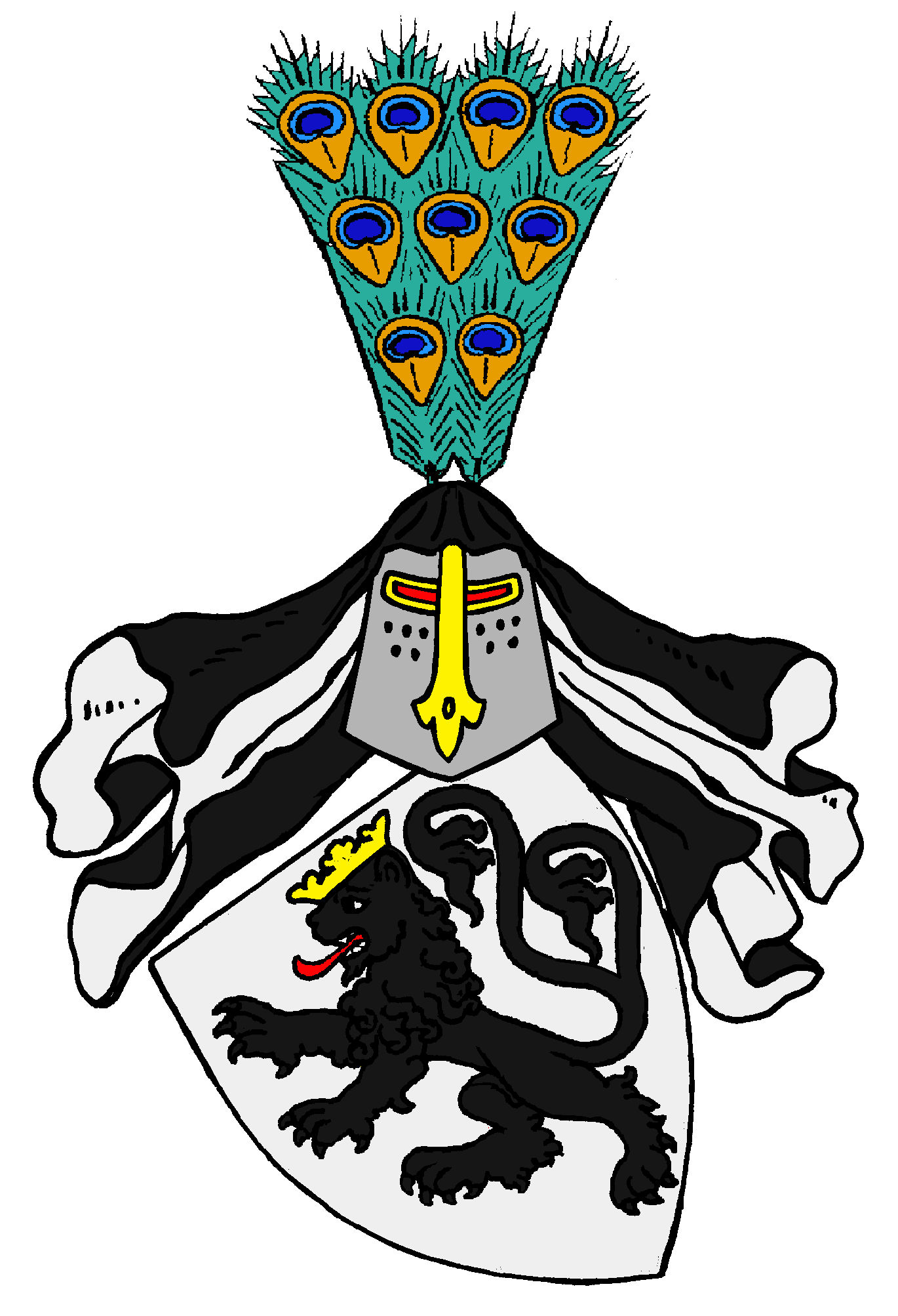 Stammwappen der von Tüllstedt genannt Strantz. Stammreihe urkundlich seit 1120, edelfreies thüringisches Geschlecht, Burggrafen zu Leisnig, seit 1210 genannt Strantz. Heute blüht nur noch die märkische Linie, beginnend mit Hermann dictus Strantz 1325. Bis zum 18. Jahrhundert im Kreis Lebus schlossgesessen, dann in der Neumark, in Pommern, Westpreußen und Schlesien. Hier Helmziervariante des Zweiges Petersdorf: Pfauenfedern statt Straußenfedern.